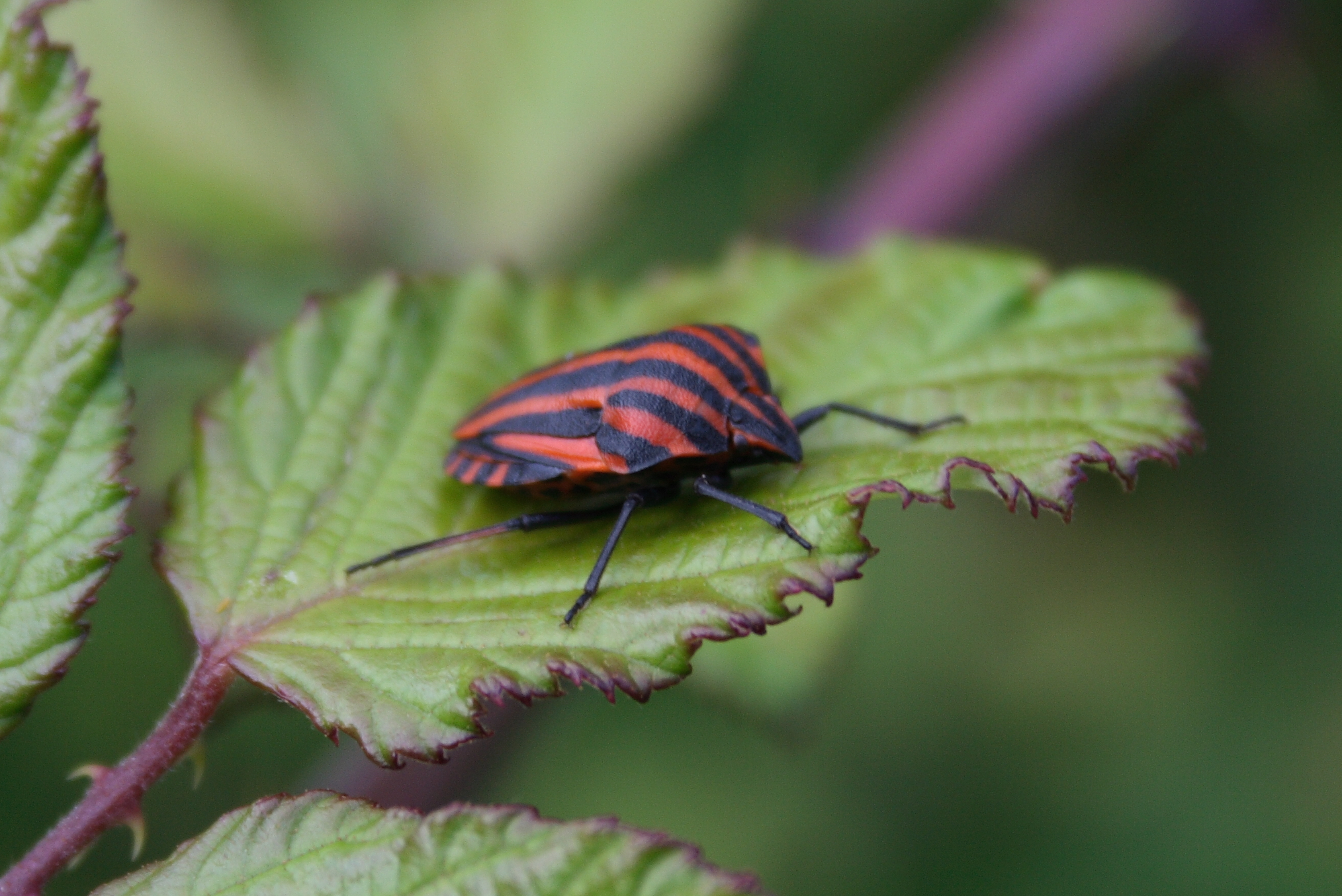 Insecto sobre hoja. Esta especie de chinche estaba relajándose en una hoja varios centímetros por debajo de la araña cangrejo.